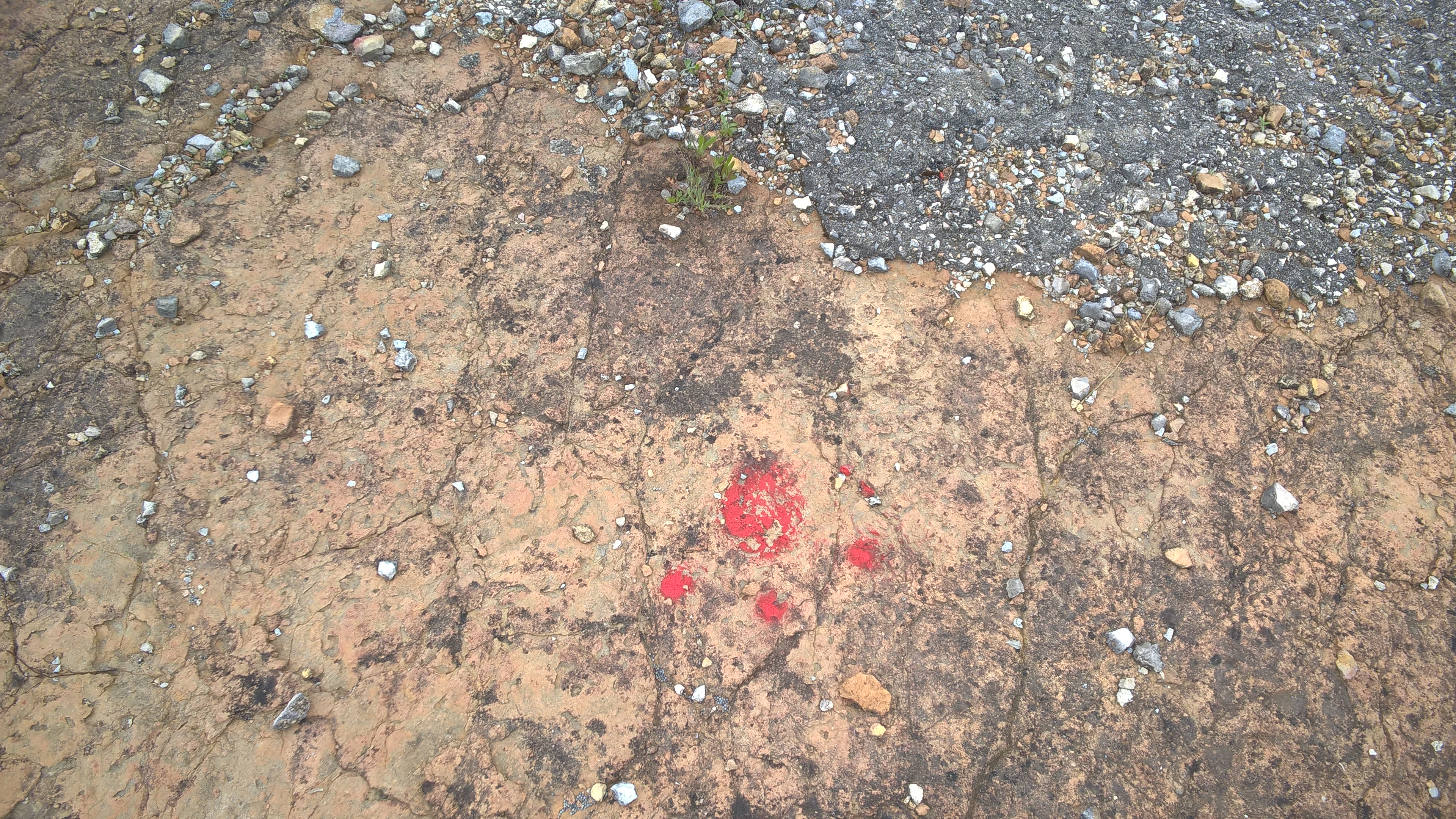 Monumento Natural de Carenque Jazida calcária com marcação a encarnado de pegada3